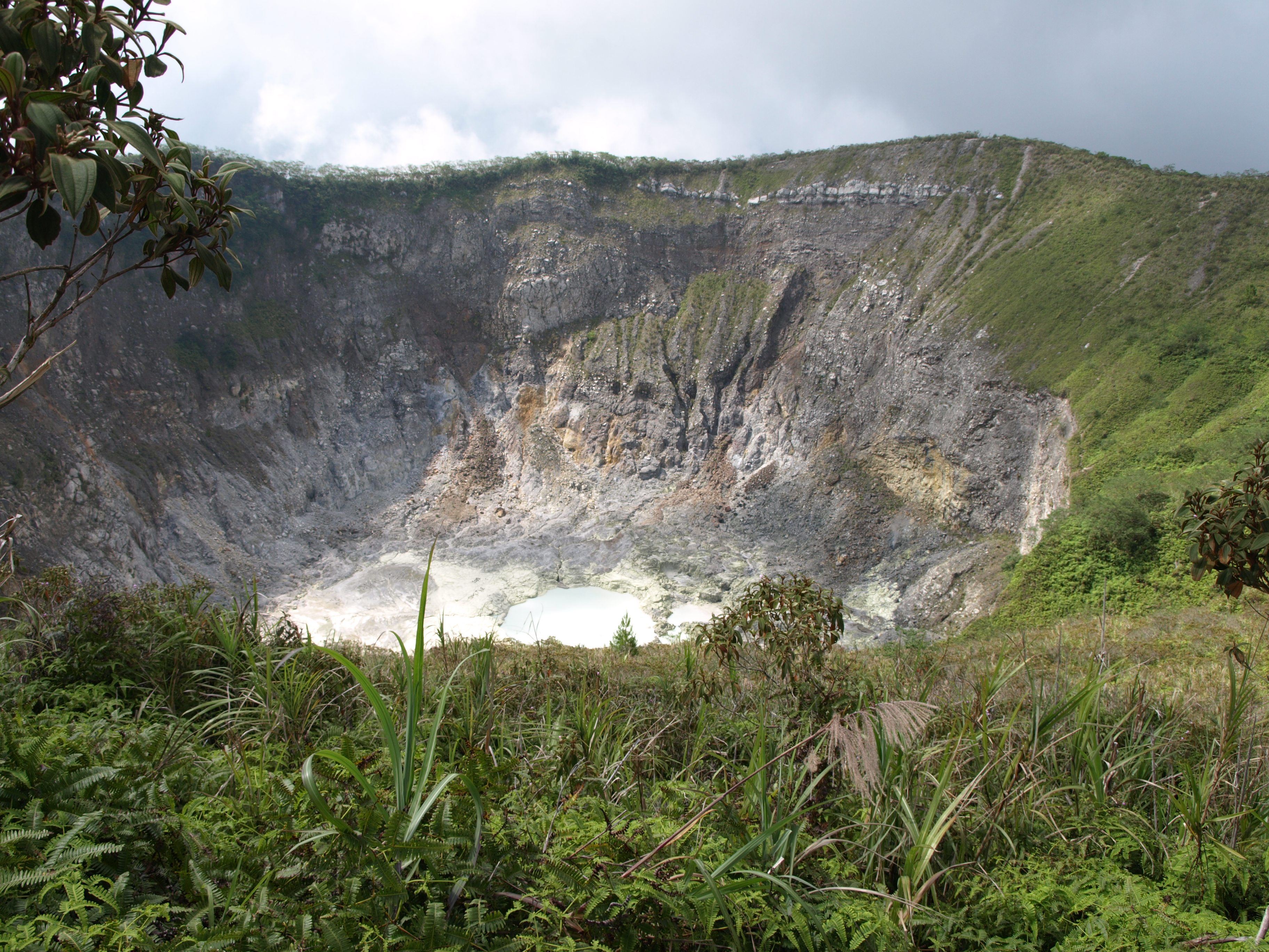 Vulkan Mahawu auf Sulawesi